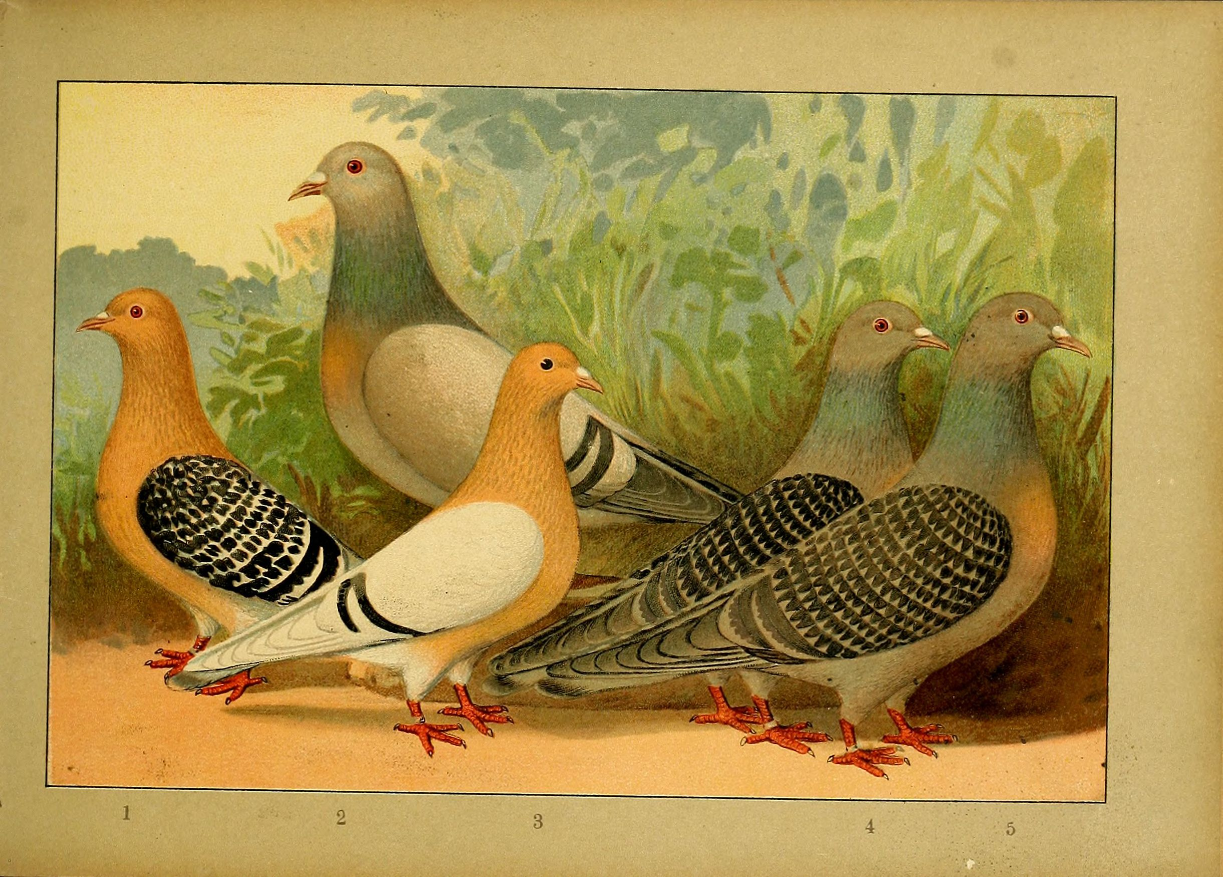 Deutsch